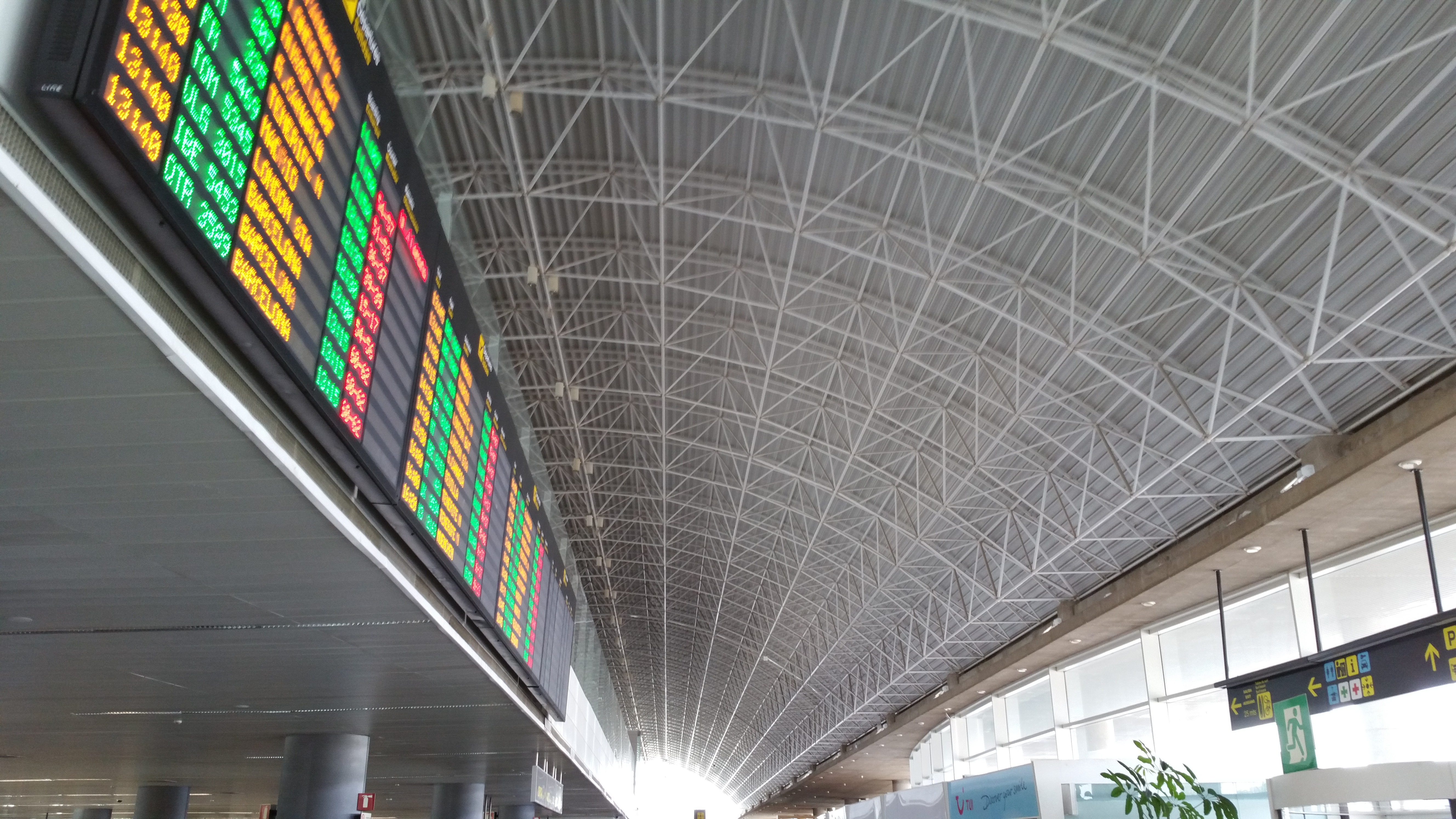 Hall avec panneau d affichage des départs